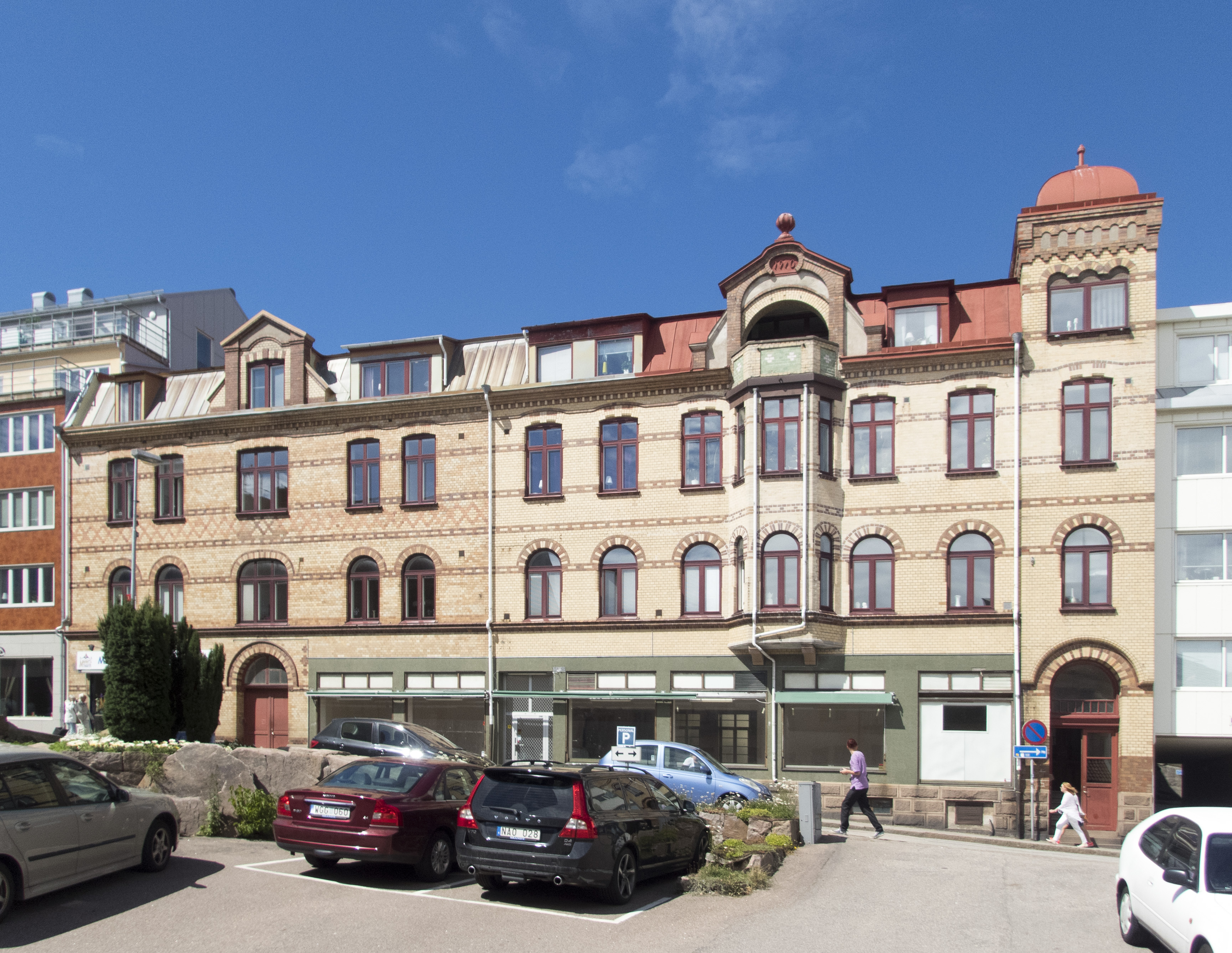 Rådhuset, Lysekil. Byggnaden fungerade som rådhus mellan 1910 - 1938. Rådhuset fungerade även som stadshus samt postkontor.